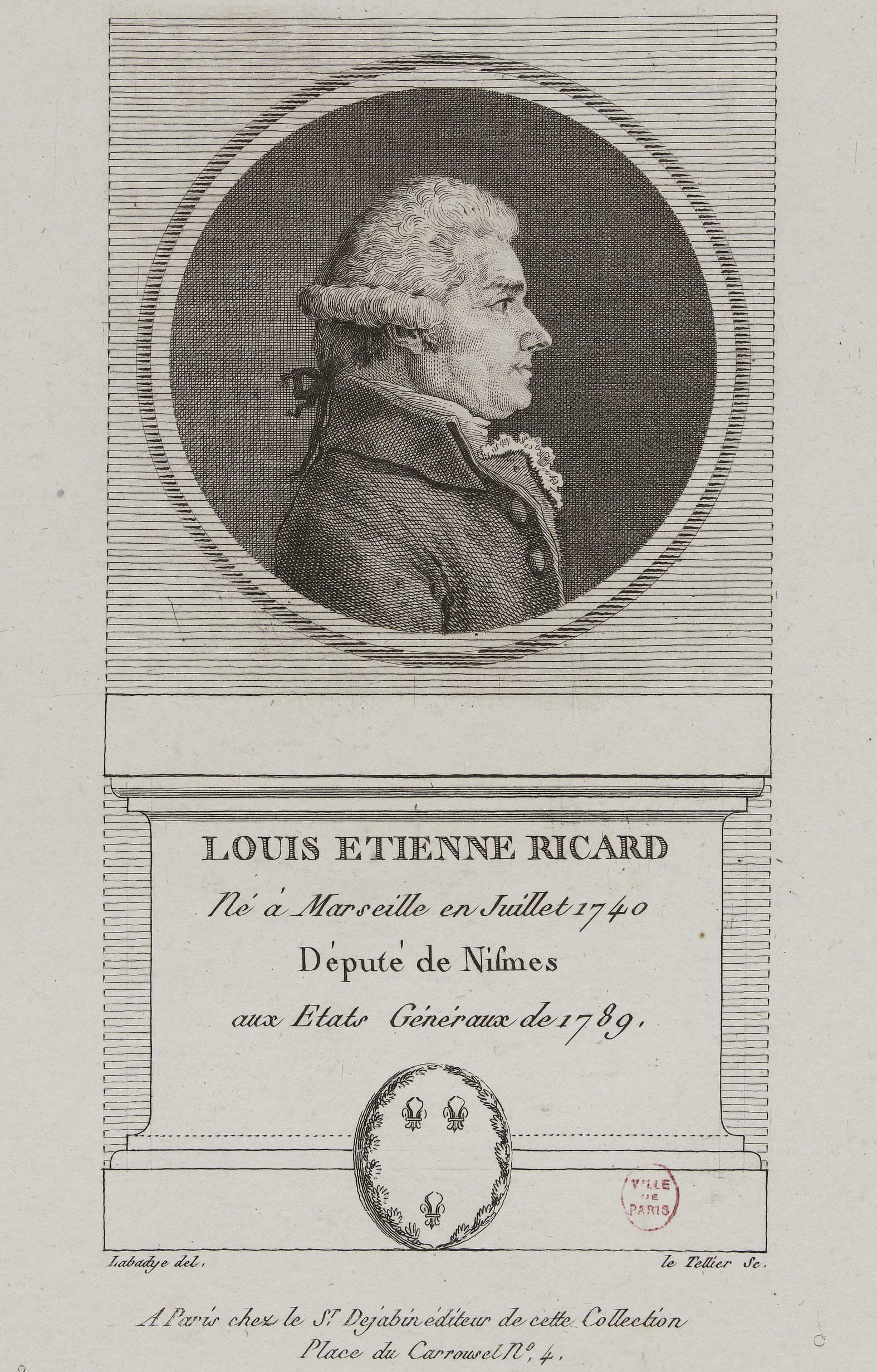 Le député français aux états-généraux de 1789, Louis-Etienne Ricard